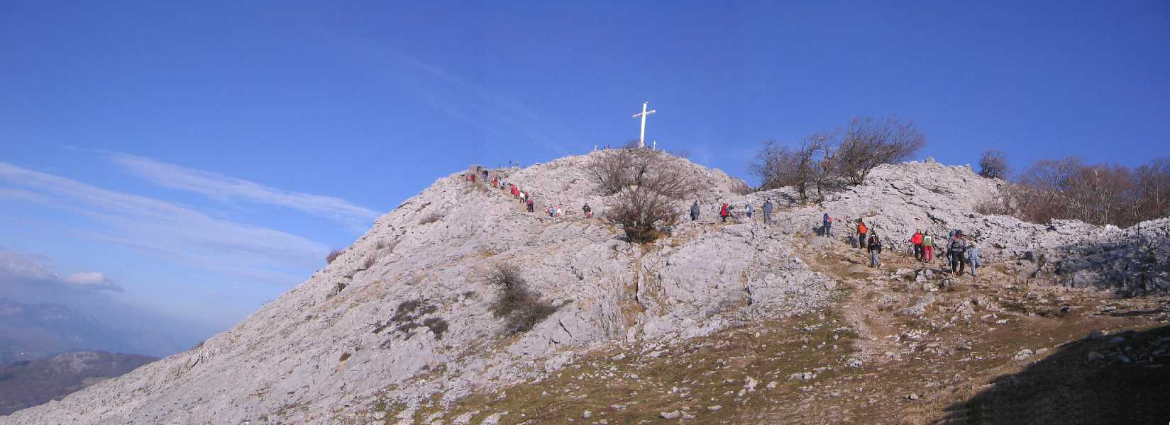 Cumbre del monte Hernio (1.075m) en Régil, Guipúzcoa, País Vasco, España